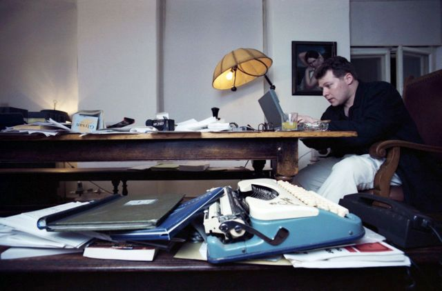 Andreas Lechner Autor, Regisseur, Komponist und Schauspieler August 1996 in seinem Atelier in München